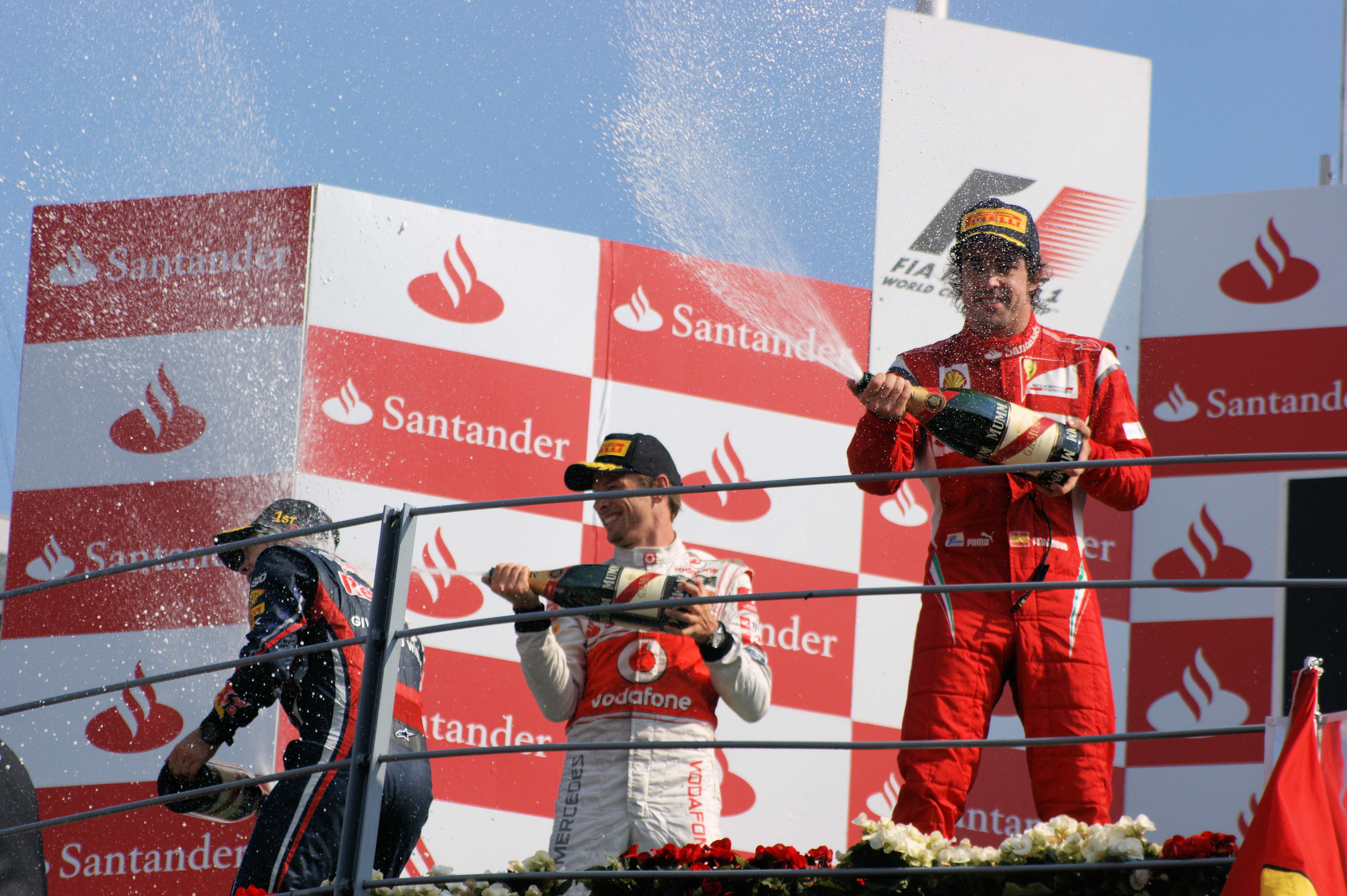 Il podio visto dalla pista Monza 2011